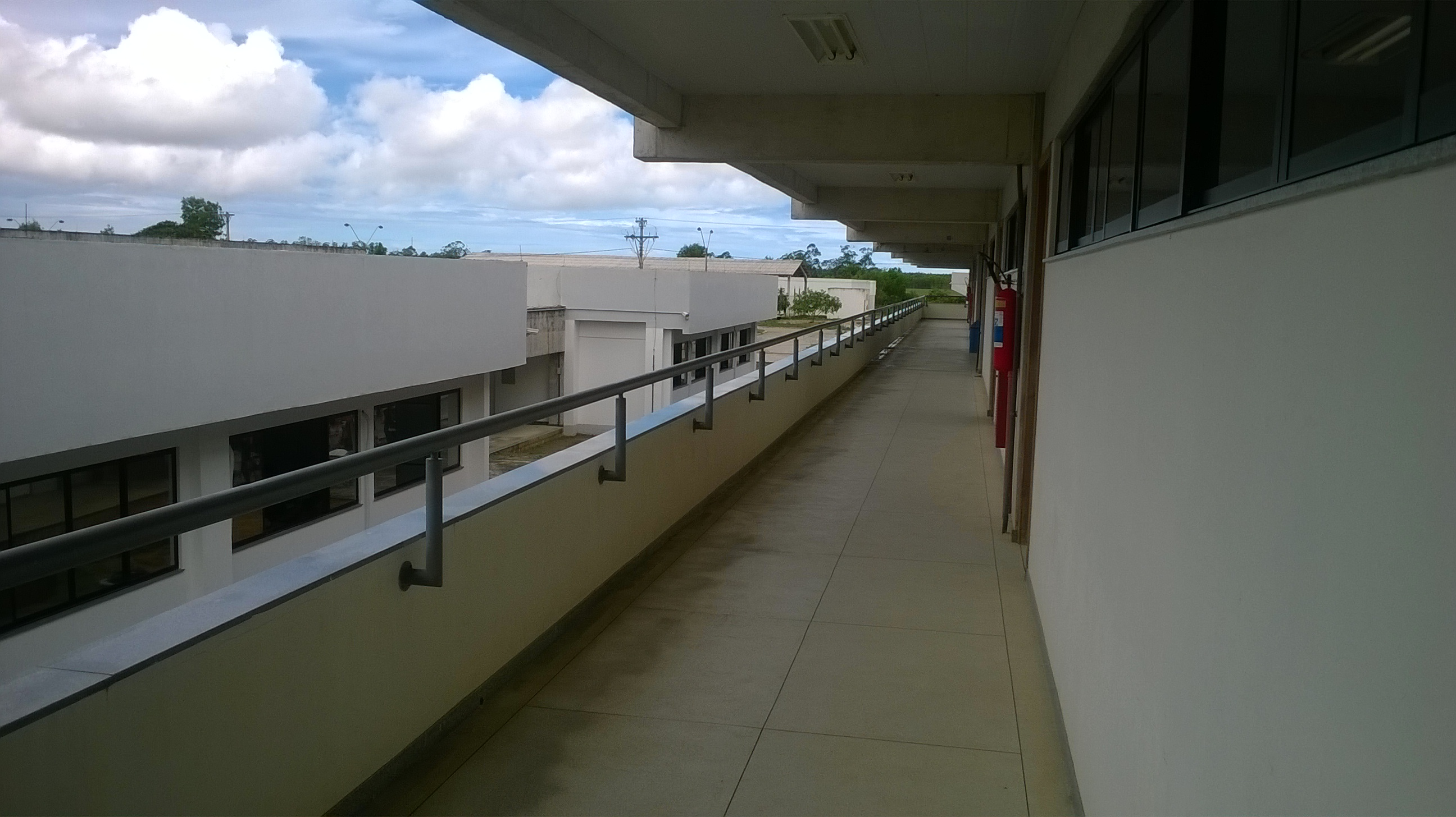 Pavilhão de aulas do CEUNES